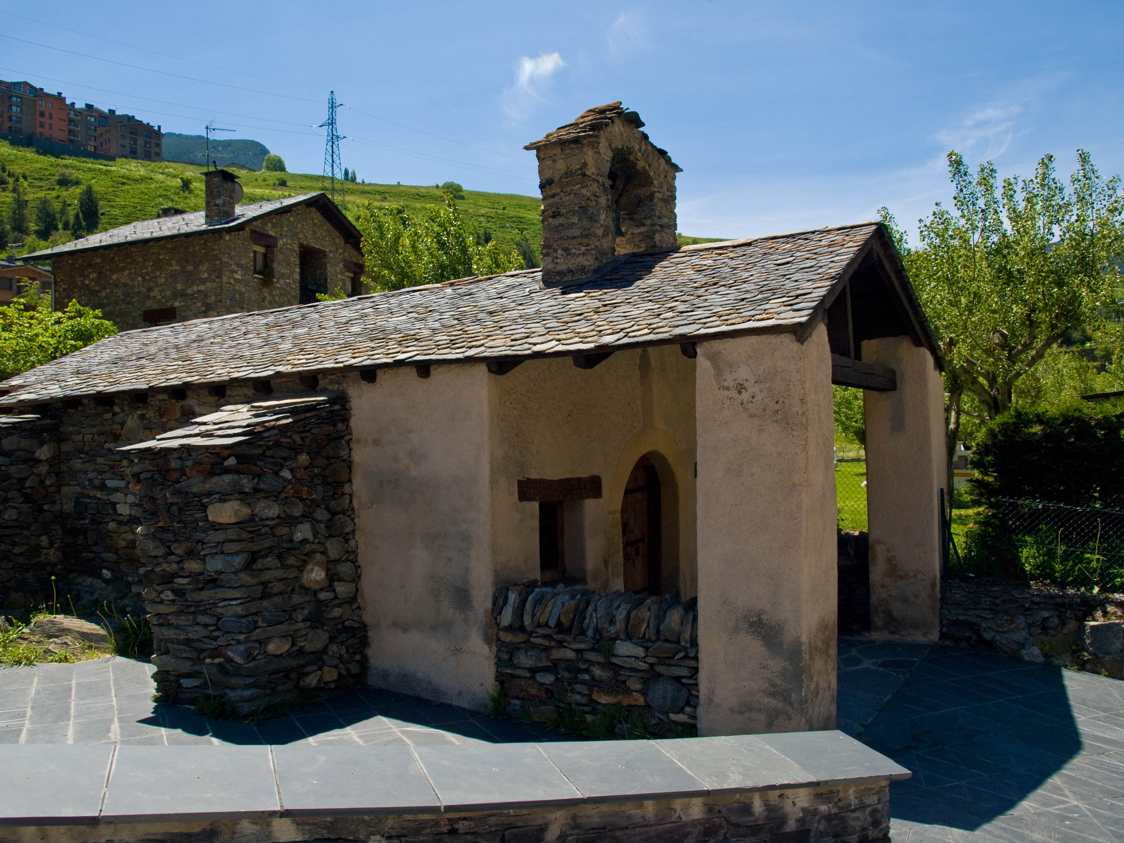 Església de la Santa Creu (Canillo)